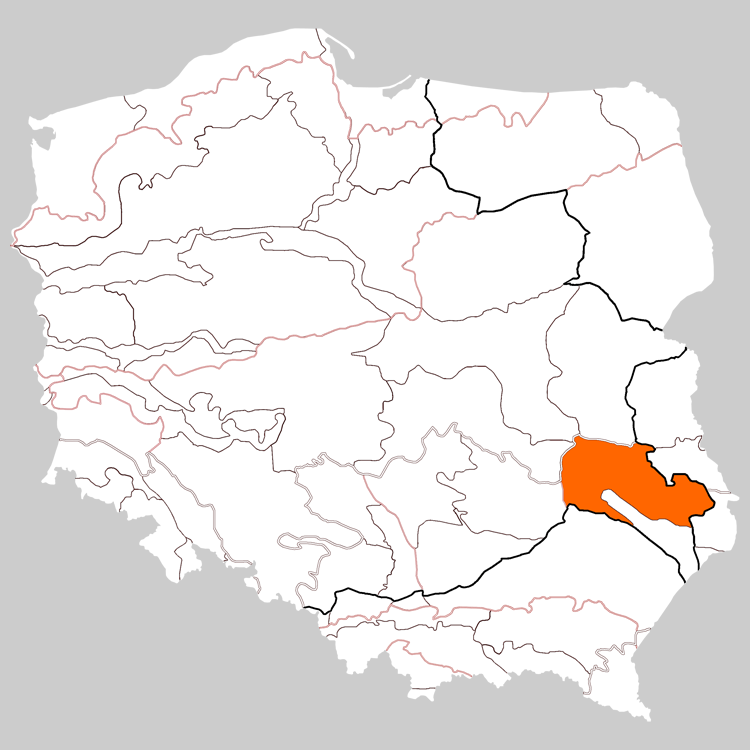 Physico-geographical regionalization of Poland Macroregion 343.1 Lublin Upland Regionalizacja fizycznogeograficzna Polski Makroregion 343.1 Wyżyna Lubelska